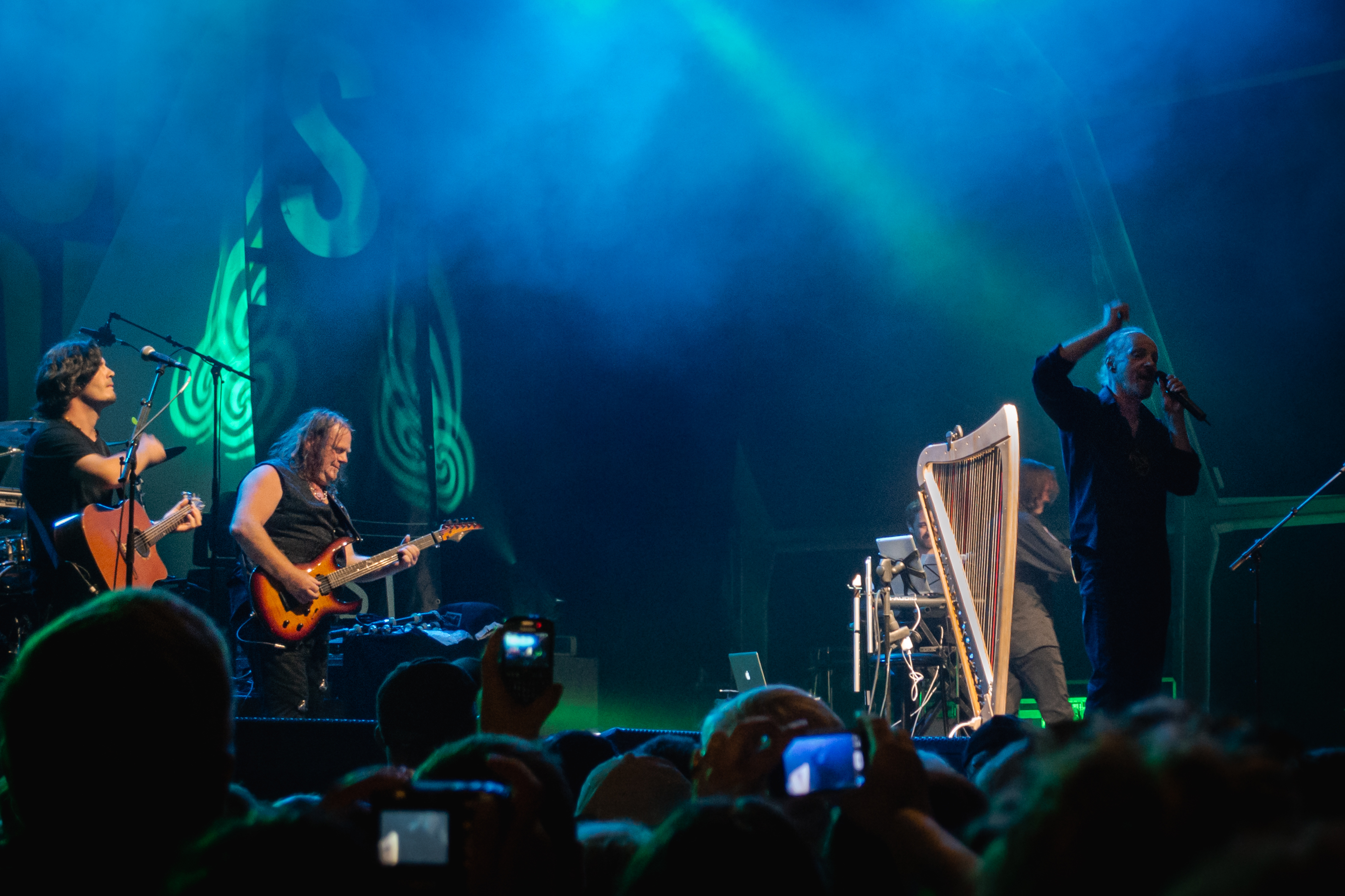 Alan Stivell en concert gratuit lors des Jeudis du port à Brest le 15 août 2013, avec en guest Pat O'May.